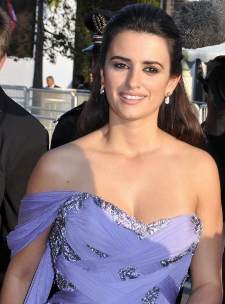 Penélope Cruzová na festivalu v Cannes